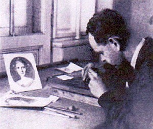 Jan Mráček (1909-1987), český rytec